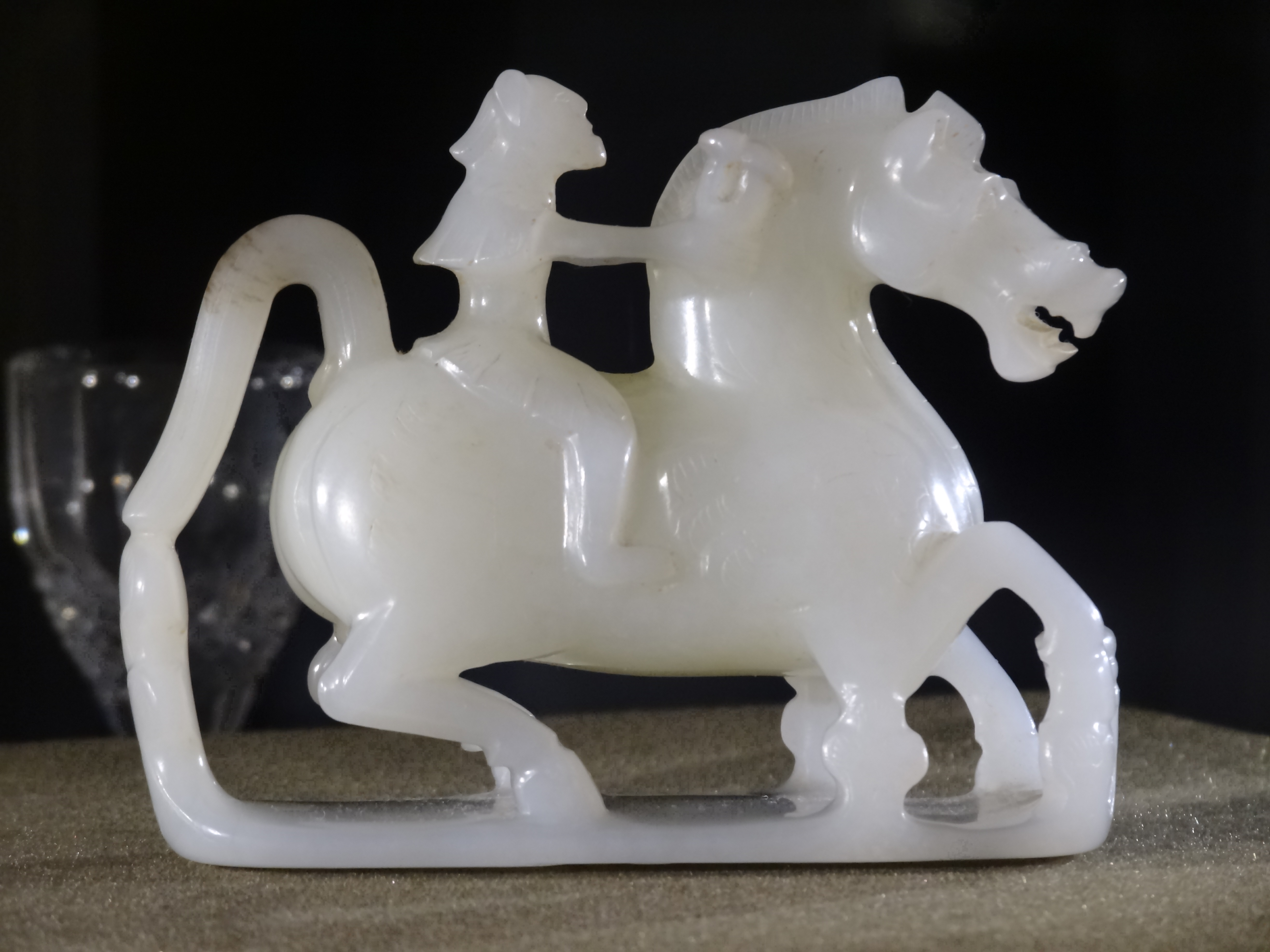 玉仙人奔马，现藏于咸阳博物馆